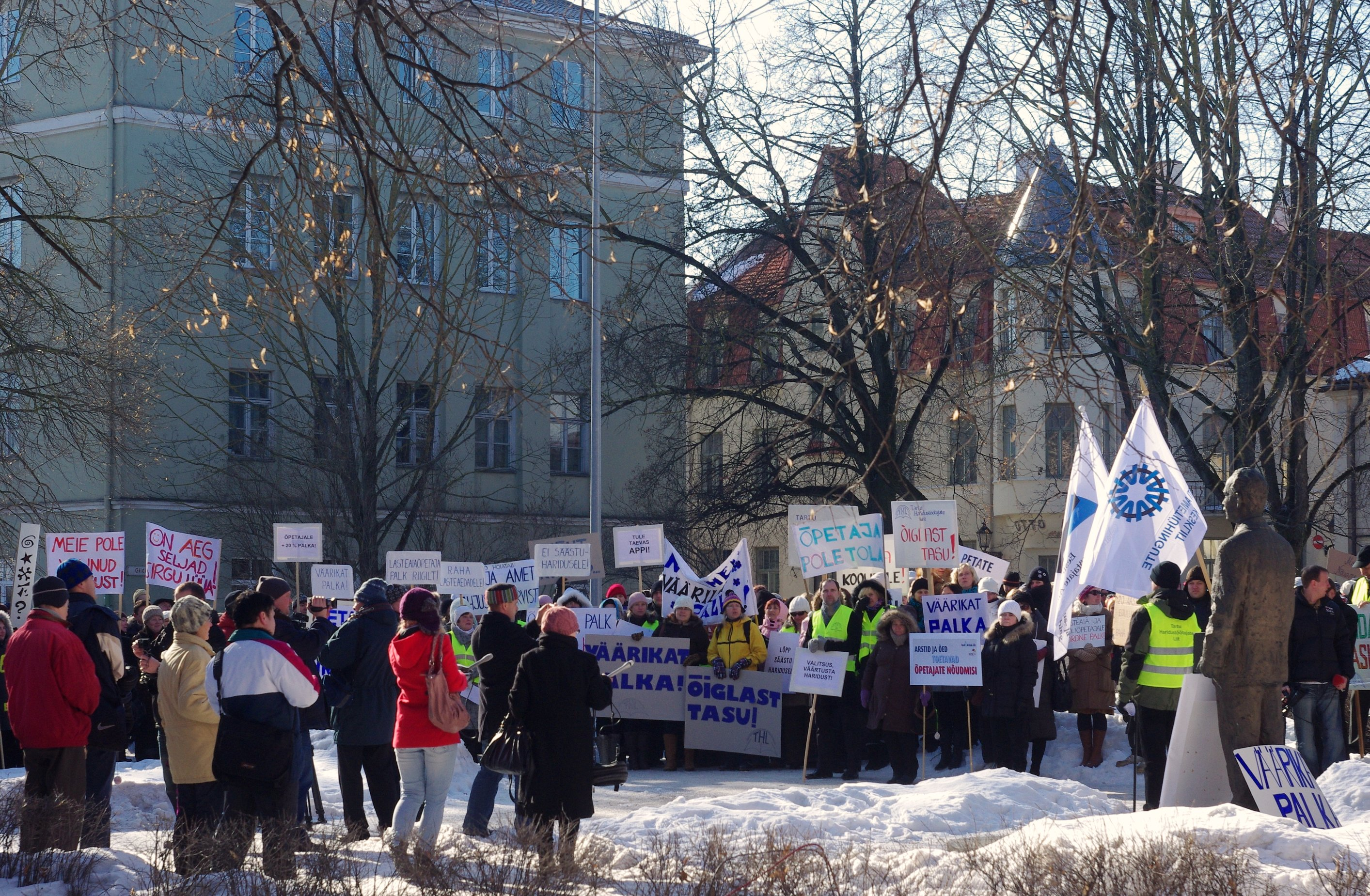 Õpetajate streik Tartus haridusministeeriumi hoone ees 7. märtsil 2012